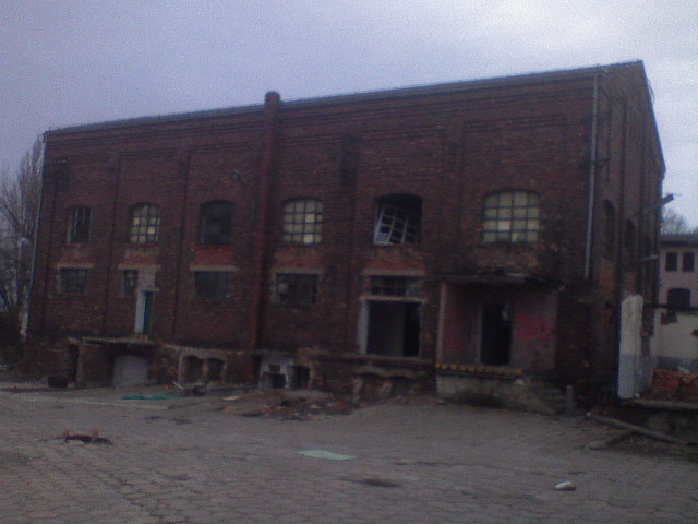 Zielona Góra - stary zakład włókienniczy / była baza przemysłu mleczarskiego. (1884r.)